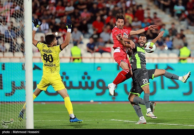 مازِرونی: نساجی و پرسپولیس کا